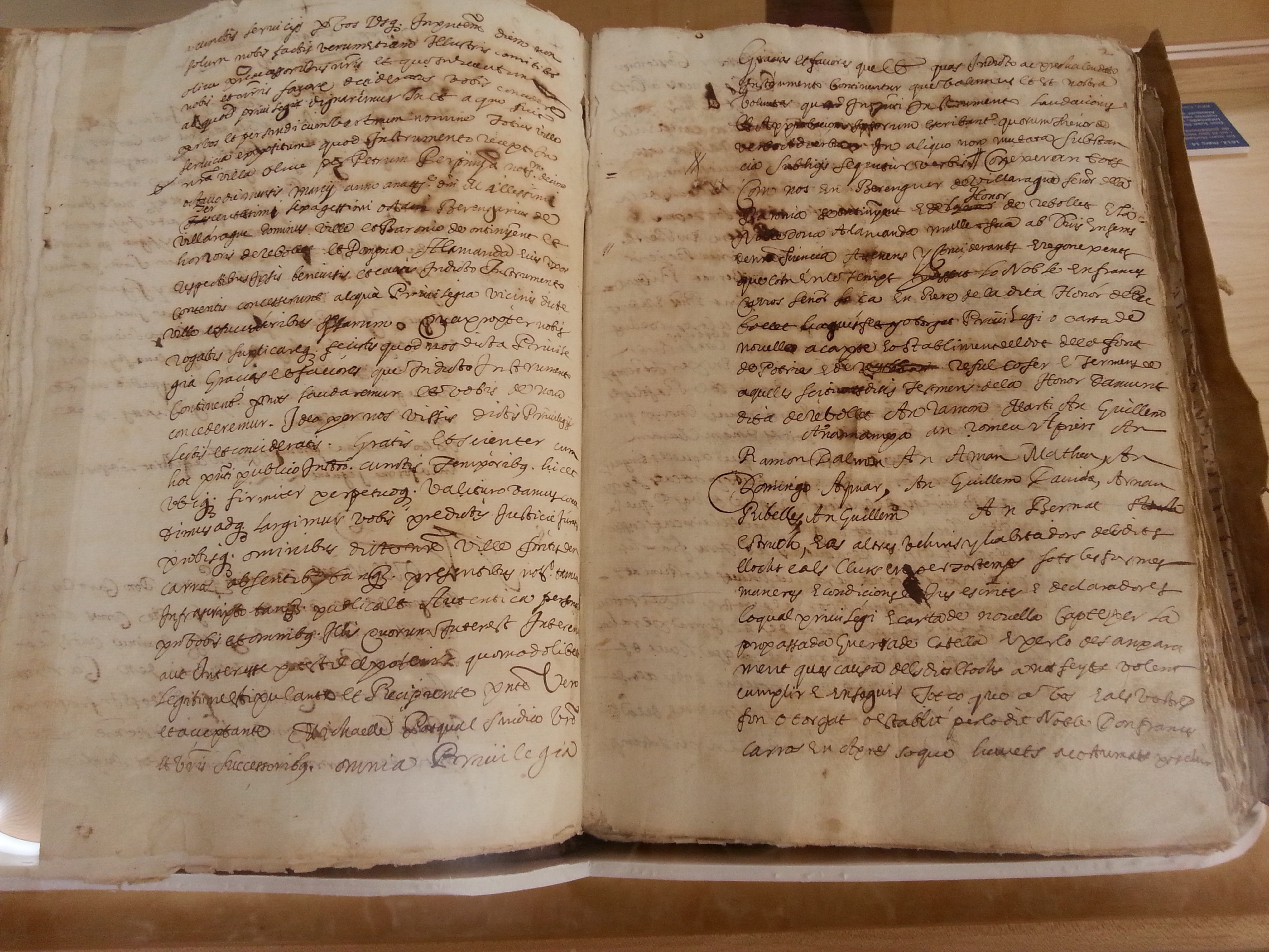 En Berenguer de Vilaragut, senyor de Ontinyent i Rebollet, amba la seua dona Alamanda, atorguen carta pobla per als cristians de tres pobles de l'Honor de Rebollet: la Font d'en Carròs, Potries i Rafelcofer, à fur de València (18 de marzo de 1368). ARV: Manaments i empars, llibre 1627, mà 43, fol. 2 (còpia de 21 d'agost de 1627). Arxiu del Regne de València.